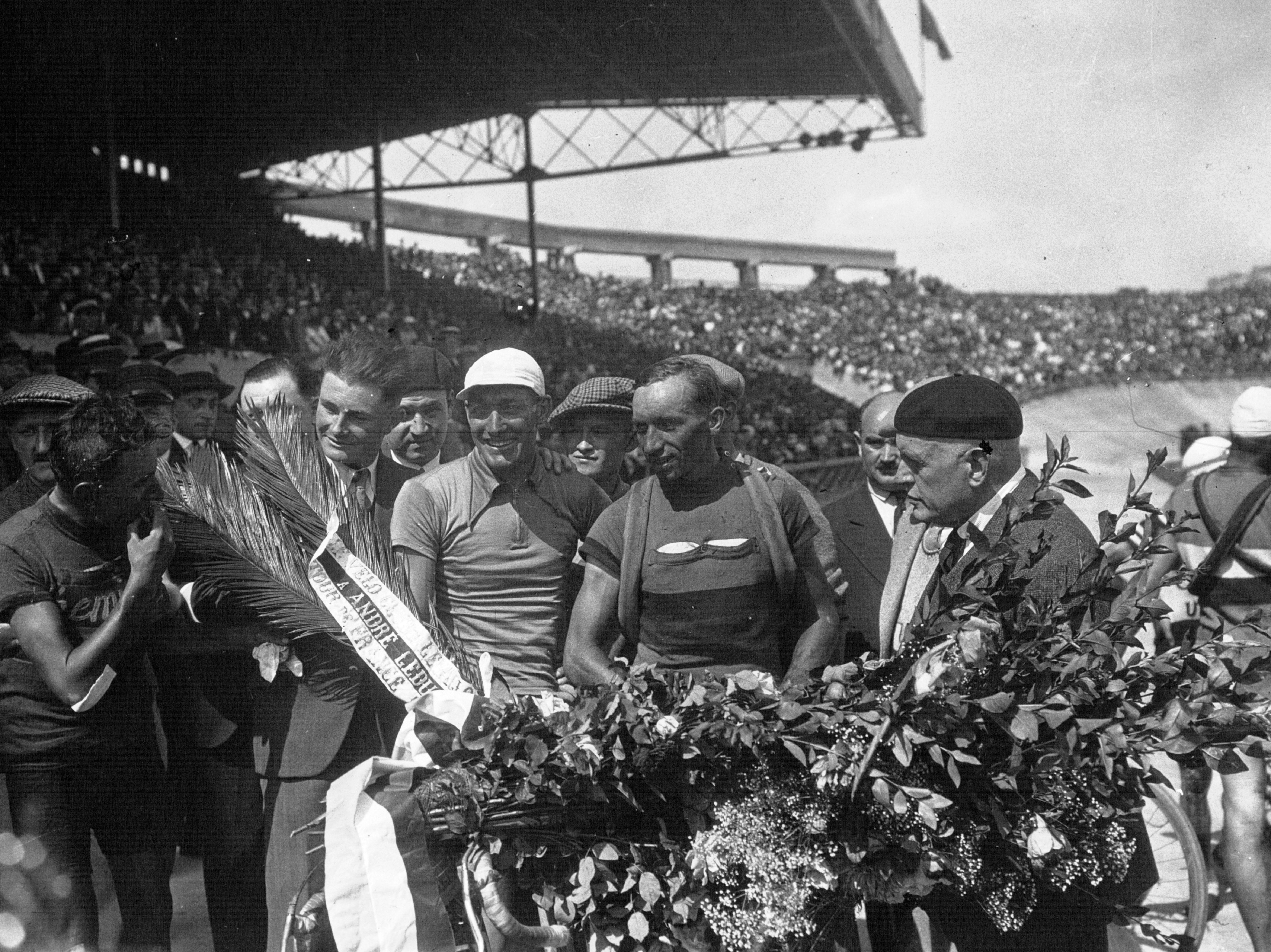 André Leducq, gagnant du Tour de France 1932 et Kurt Stöpel, second